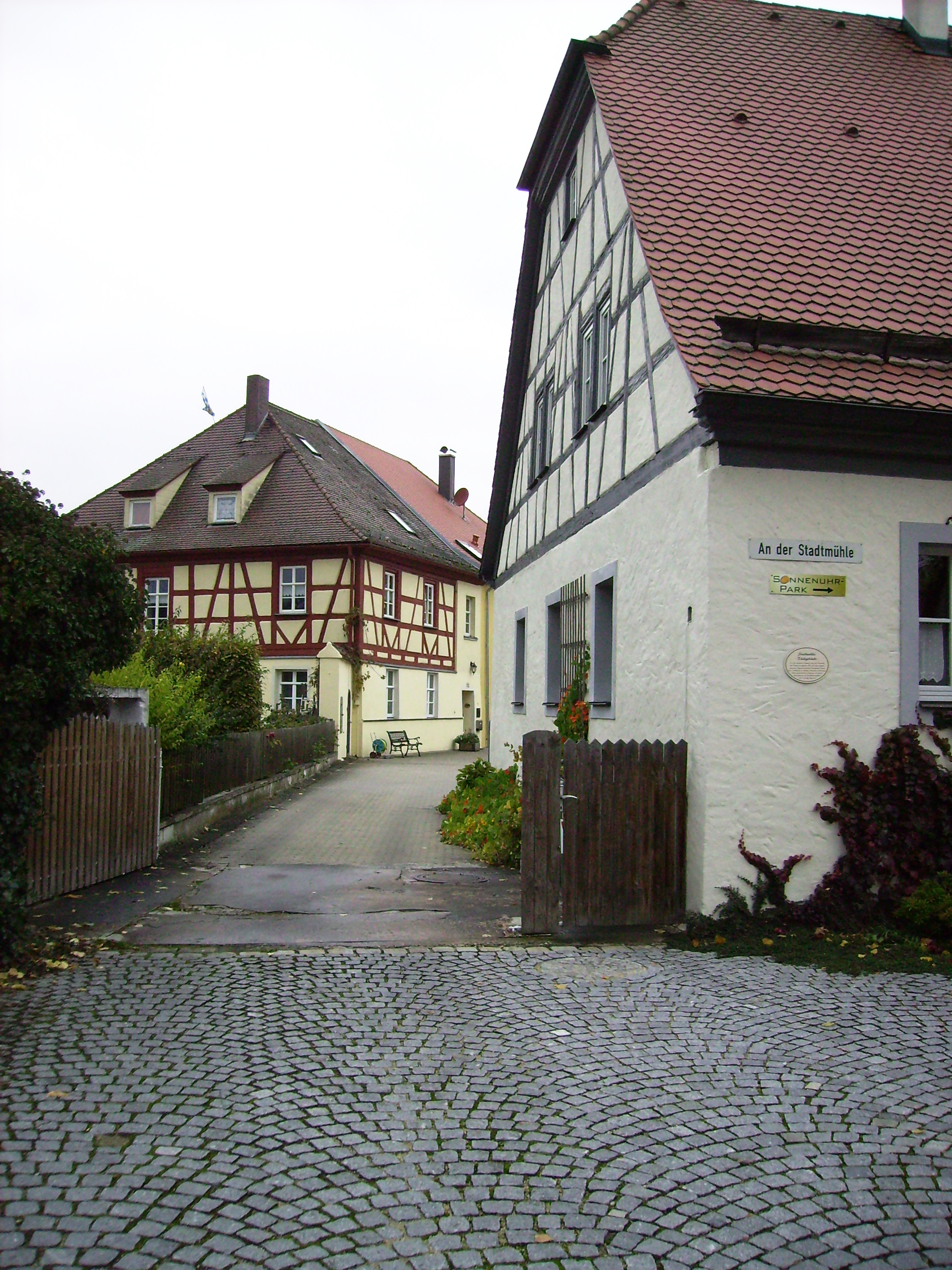 Wassertrüdingen: Gebäude der Stadtmühle